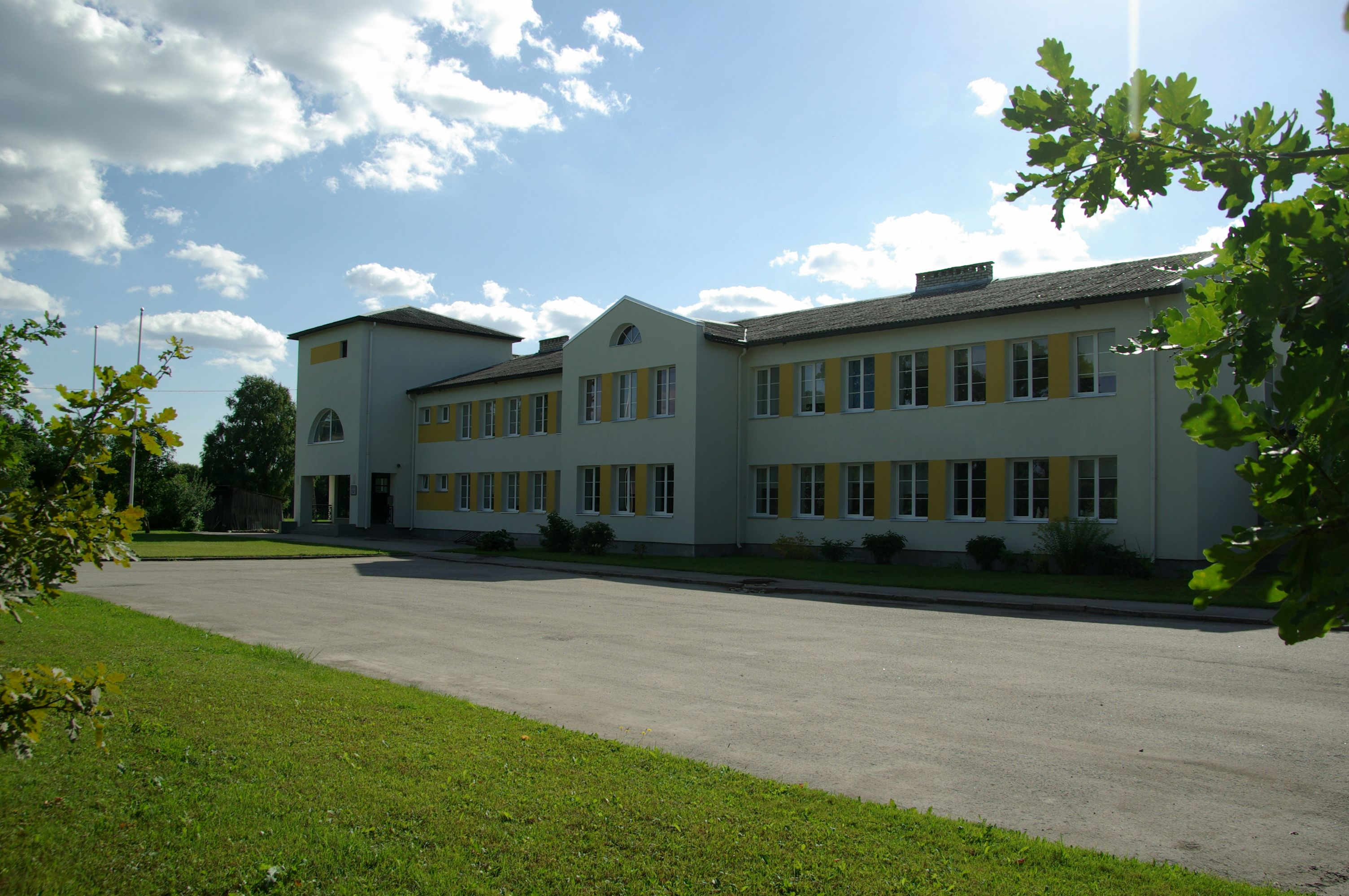 Rapla maakond, Kehtna vald